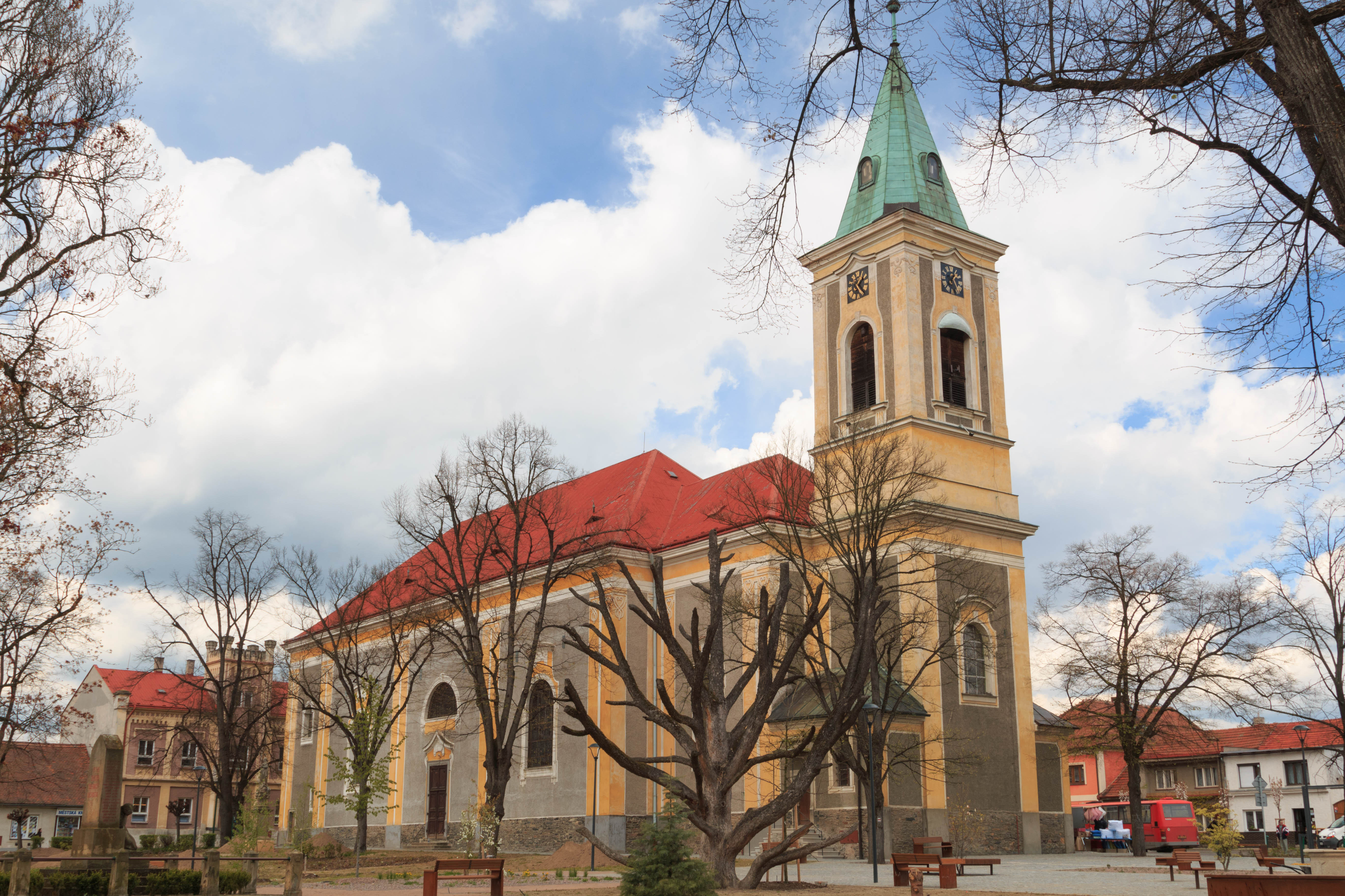 Church of Saint Lawrence (Ronov nad Doubravou)